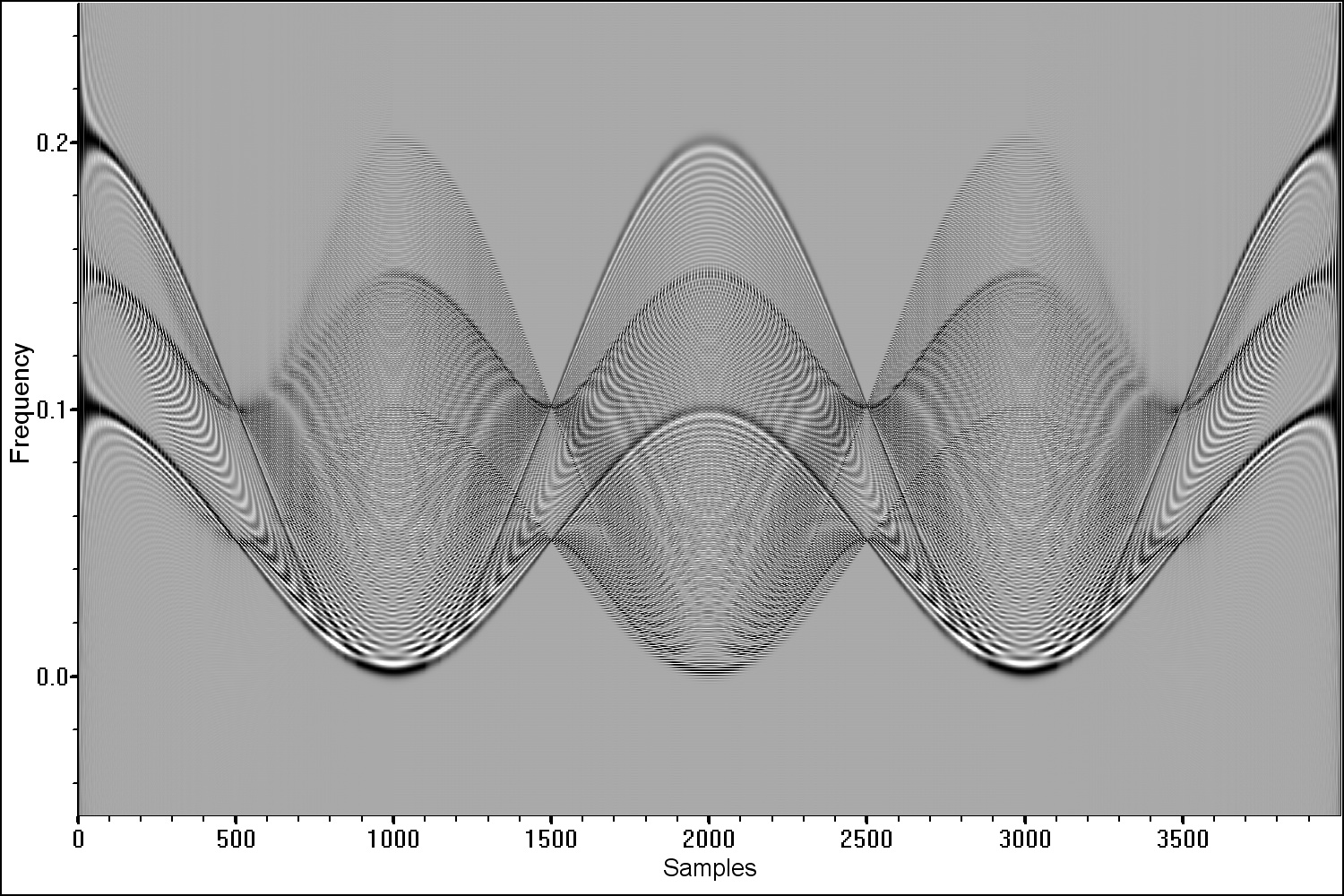 Wigner-Ville distribution (размер окна=2000 отсчетов)